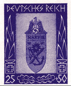 Komplettfälschung einer Briefmarke angeblich für den deutschen Sieg in Narvik 1940 ausgegeben. Unmittelbar nach dem Krieg von einem unbekannten Fälscher gedruckt.